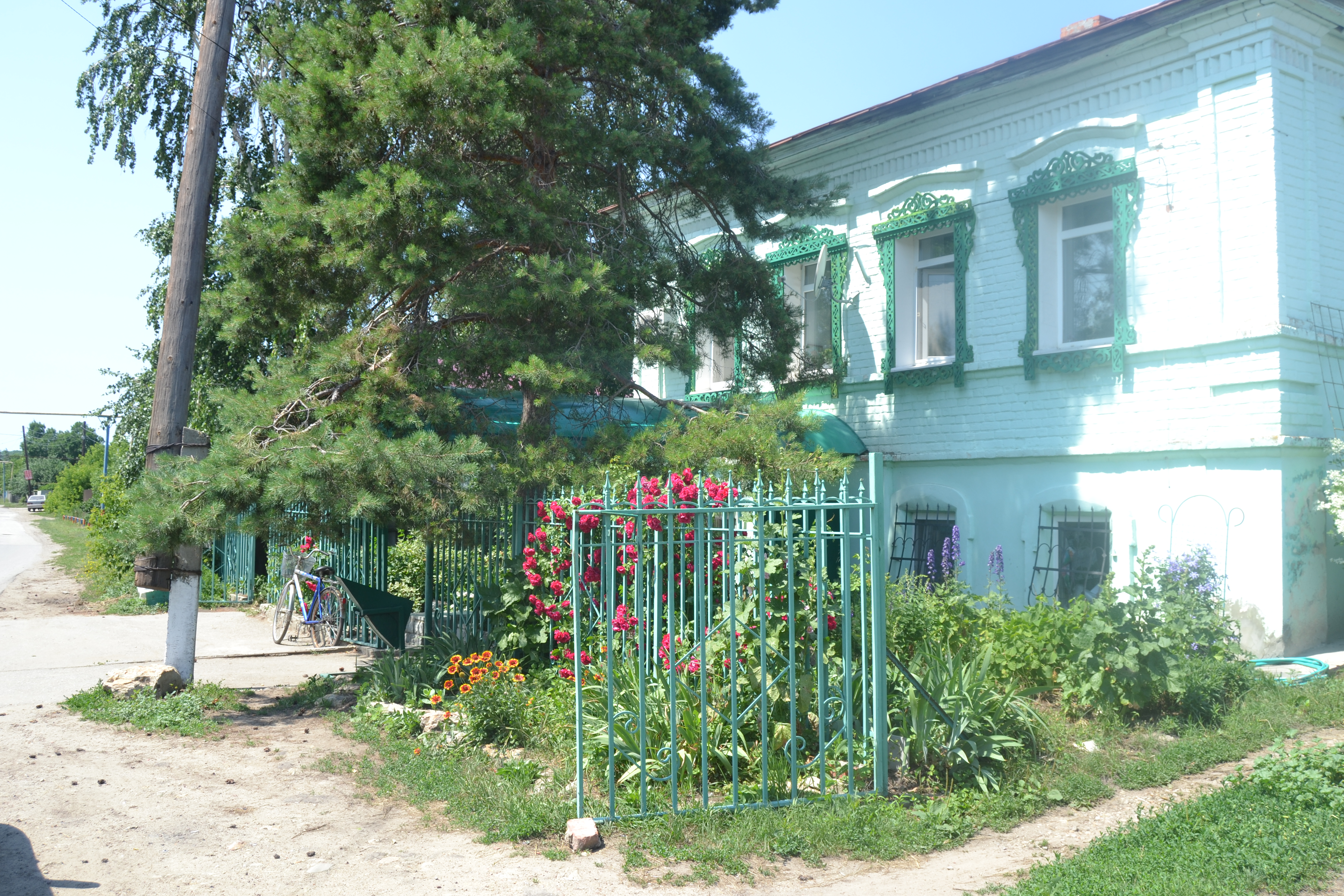 Изображение населённого пункта. Жилой дом (Поповка, Саратовский район)